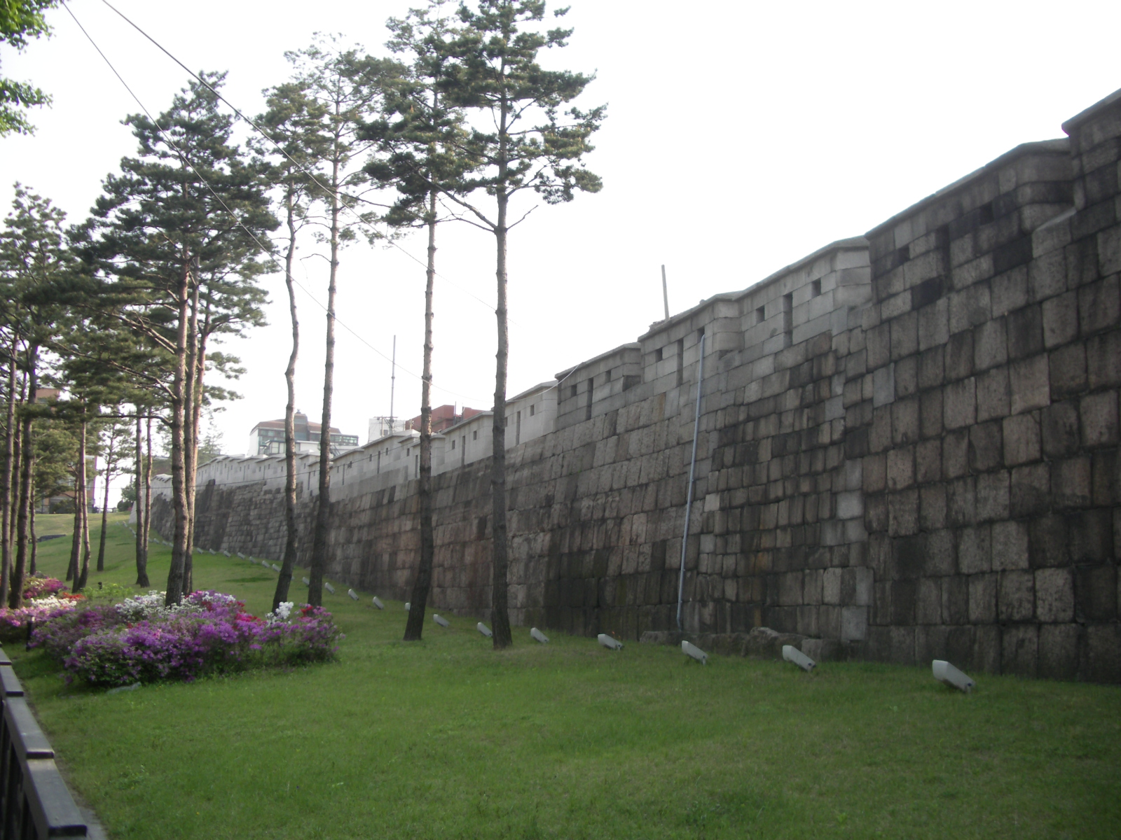 서울 성곽(광희문에서 장충동 방면으로)